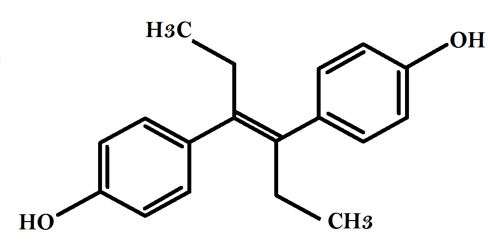 Естроген синтетичного походження, хімічна формула.